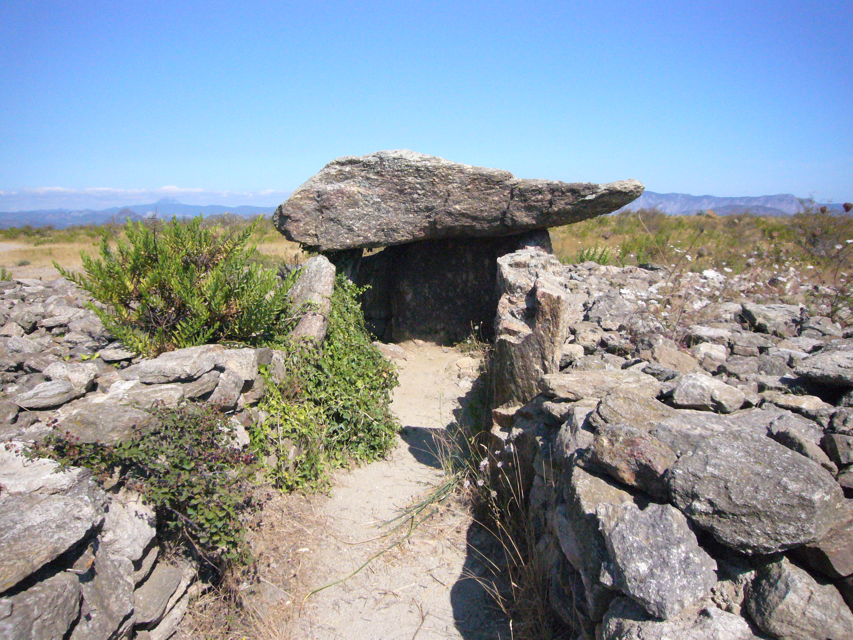 Le dolmen du Moli del Vent de Bélesta (66, France)